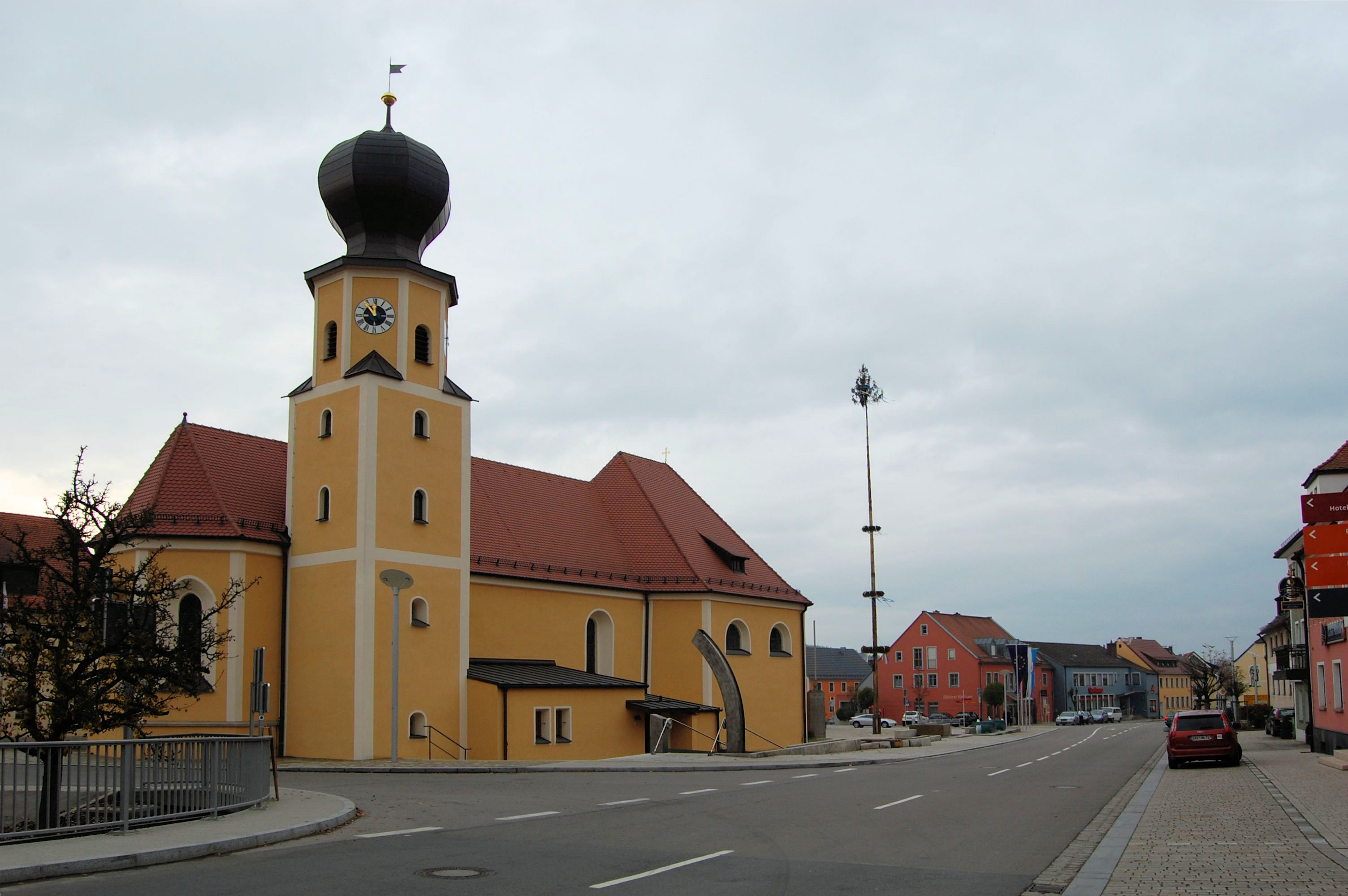 Wernberg-Köblitz, Pfarrkirche St. Anna